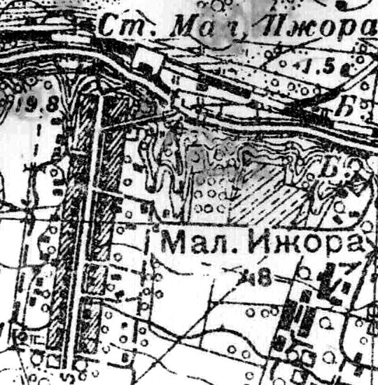 Топографическая карта Ленинградской области, квадрат О-35-12-А-б (Мал. Ижора), деревня Малая Ижора